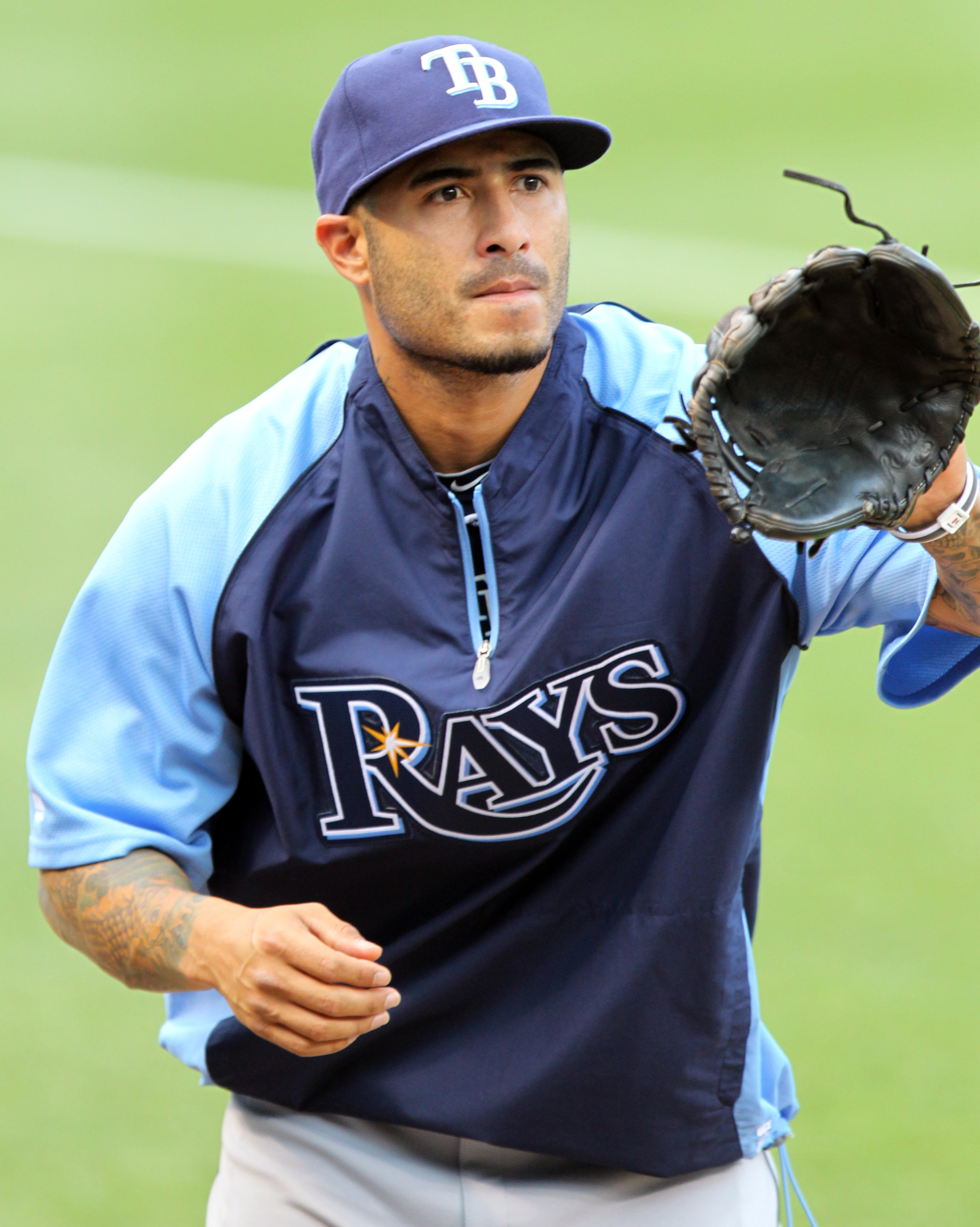 Felipe López